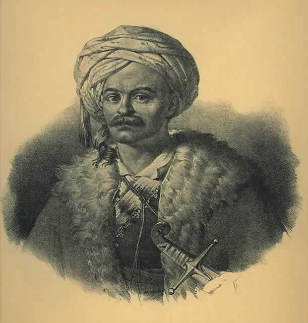 Charles Favier (1783-1855), French general, commander of the Greek tactical army during the Greek War of Independence. Κάρολος Φαβιέρος Lithography by Karl Krazeisen (1794-1878) from Bildnisse ausgezeichneter Griechen und Philhellenen nebst einigen Ansichten und Trachten. Nach der Natur gezeichnet und herausgegeben von Karl Krazeisen. Munchen 1831.